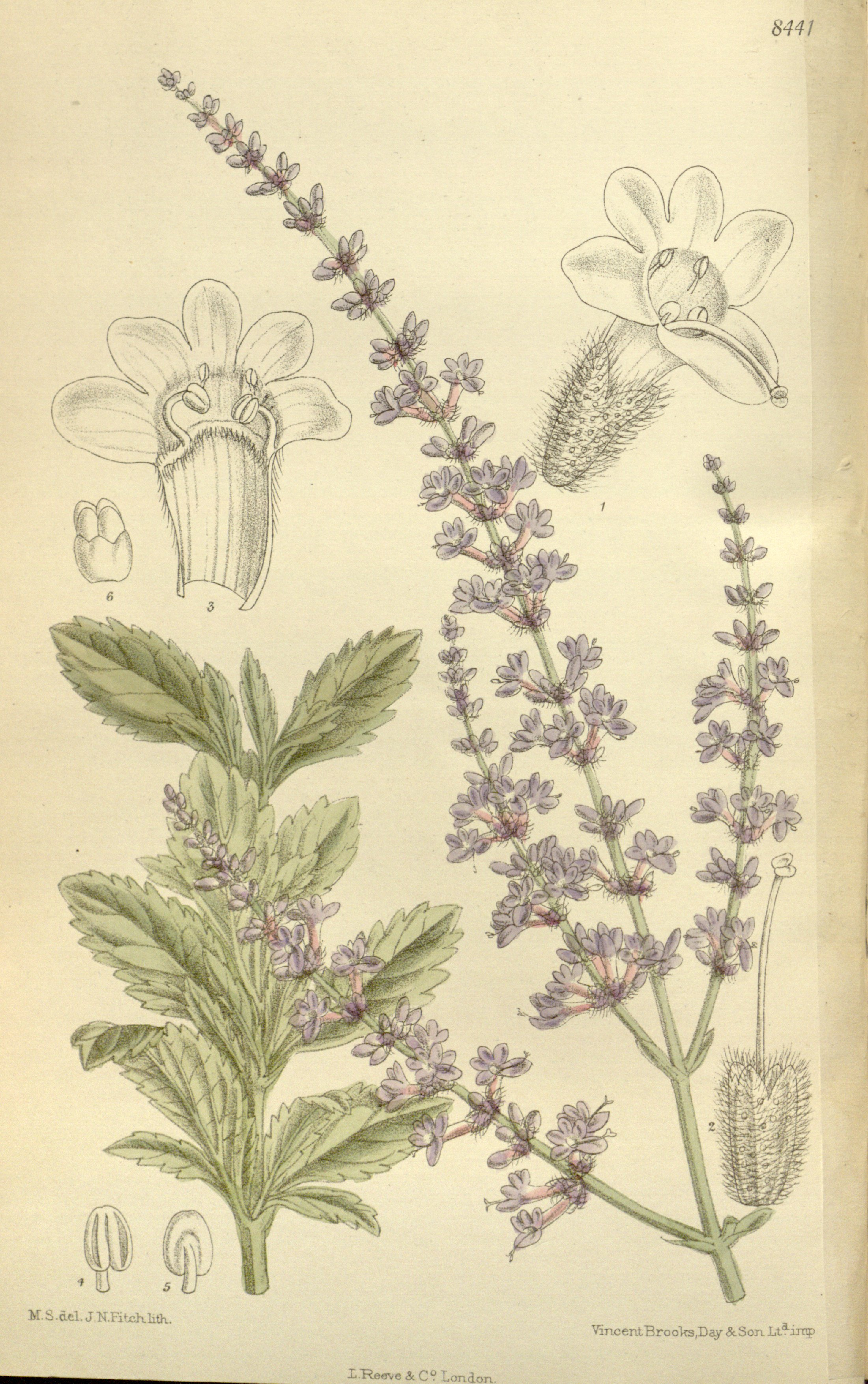 Perovskia atriplicifolia, Lamiaceae